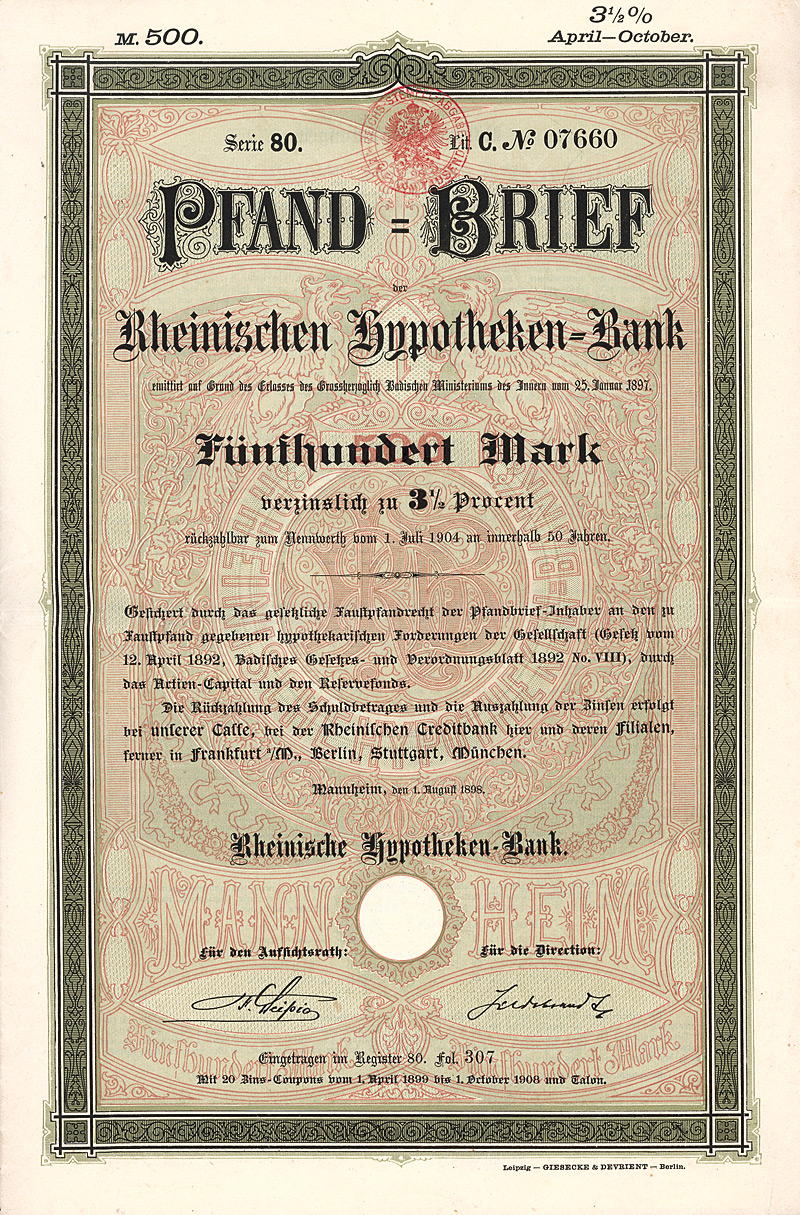 Pfandbrief über 500 Mark der Rheinischen Hypothekenbank vom 1. August 1898